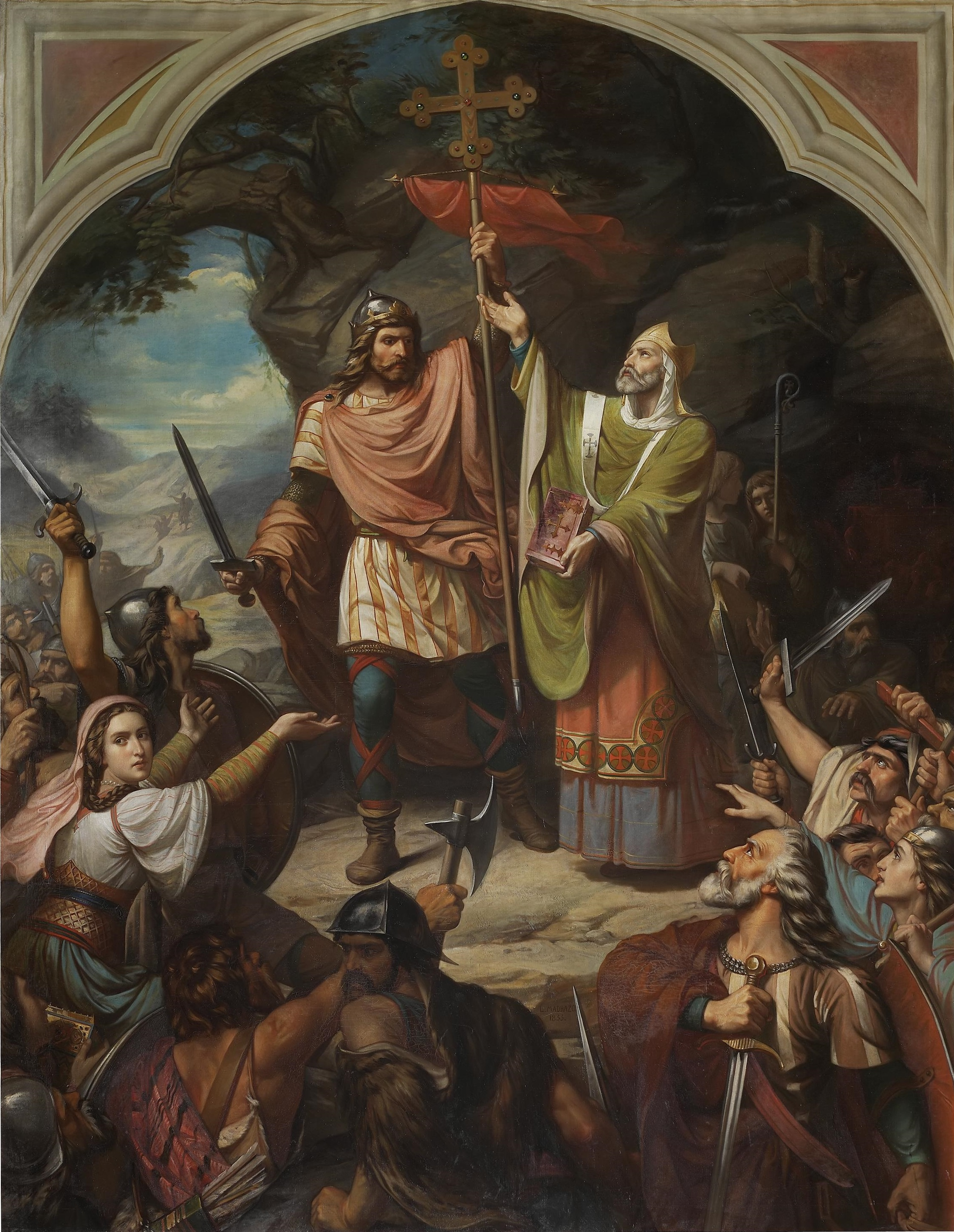 El lienzo representa la proclamación de Don Pelayo († 737) como rey de Asturias en Covadonga y el inicio de la Reconquista de España por los cristianos del norte de la Península Ibérica.